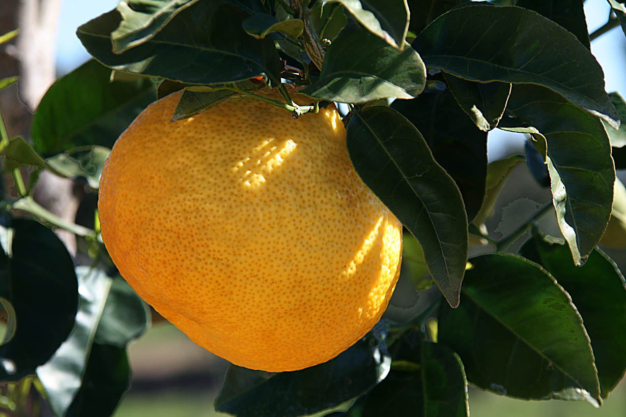 C. natsudaidai en mars fruits sur l'arbre